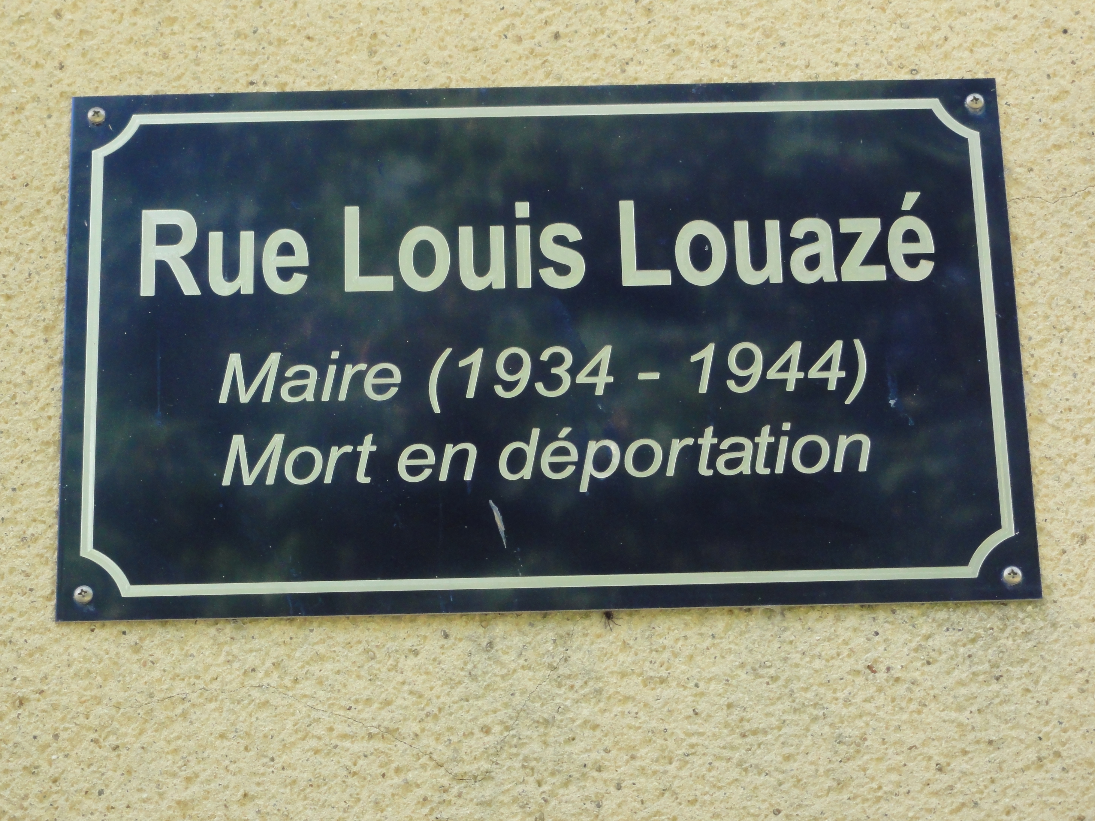 Lucé-sous-Ballon (Sarthe) plaque Rue Louis Louazé, mort en déportation